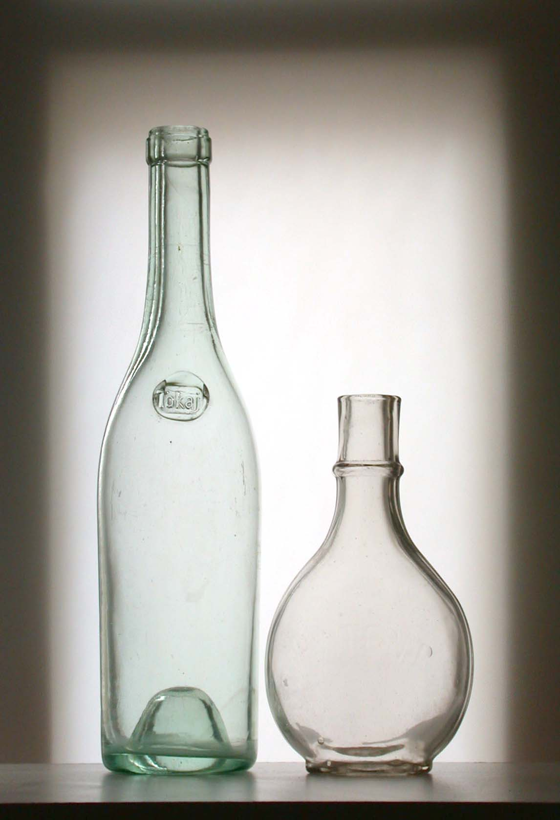 Tokaji palackok a XIX. sz. végéről.